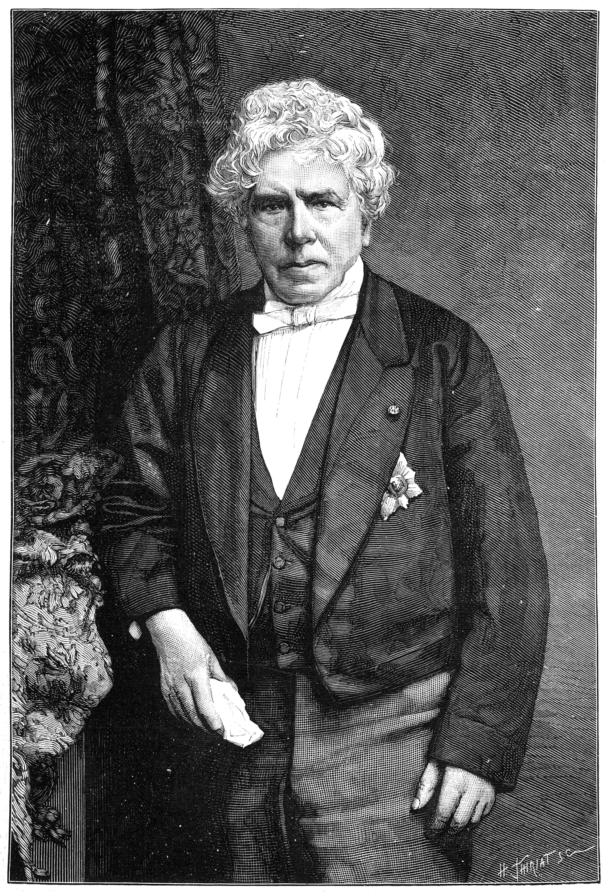 Charles Rogier, homme politique belge libéral.